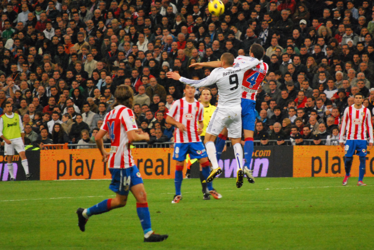 Karim Benzema (Real Madrid) and Mario Suárez (Atlético Madrid) (compare Real Madrid - Atlético Madrid 2:0 (Primera División 2010/2011, 10. Round))